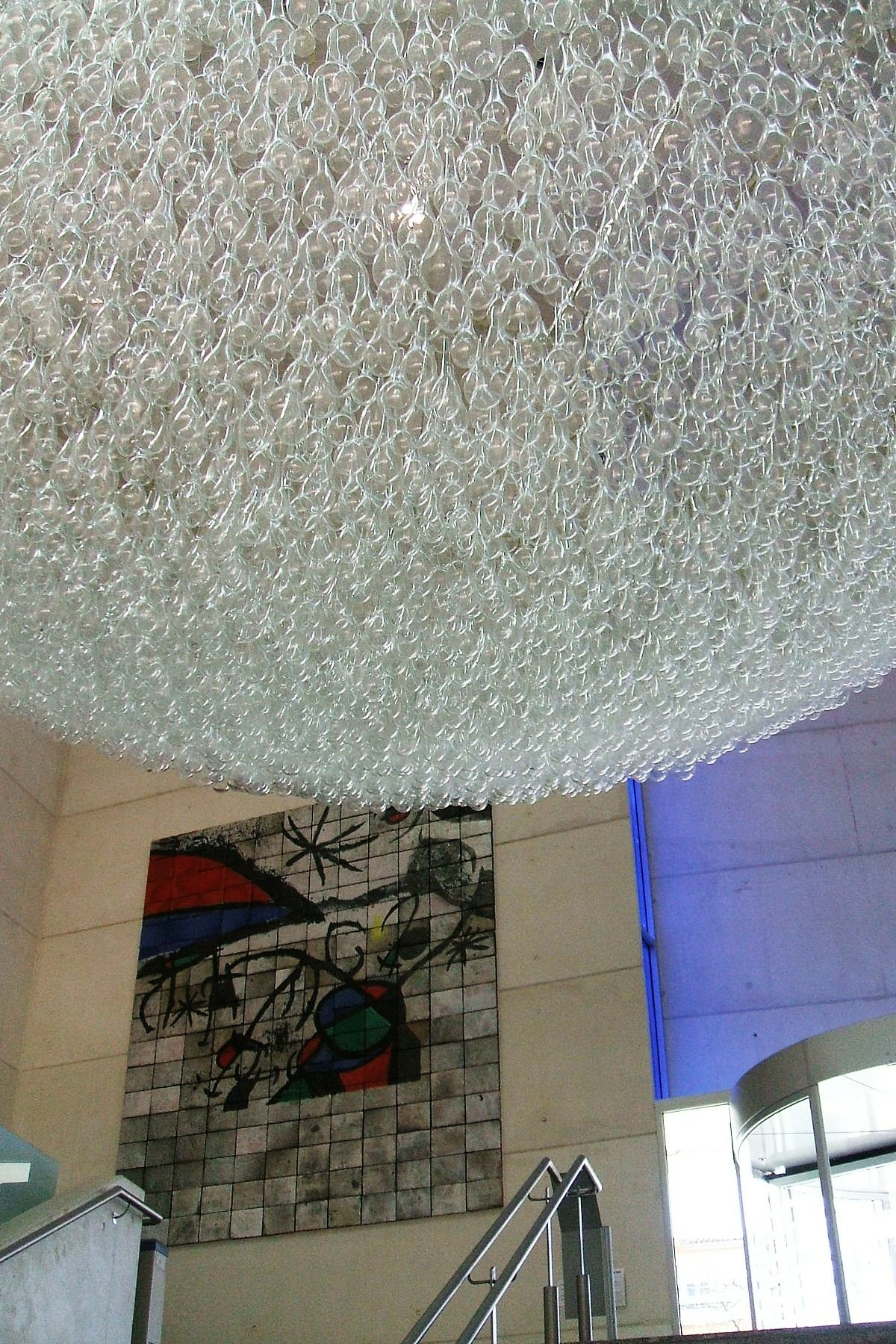 Mural cerámico, de Joan Miró y Josep Llorens Artigas, y Un Pedazo de Cielo Cristalizado, de Javier Pérez, en el vestíbulo del Centro-Museo ARTIUM de Vitoria-Gasteiz.